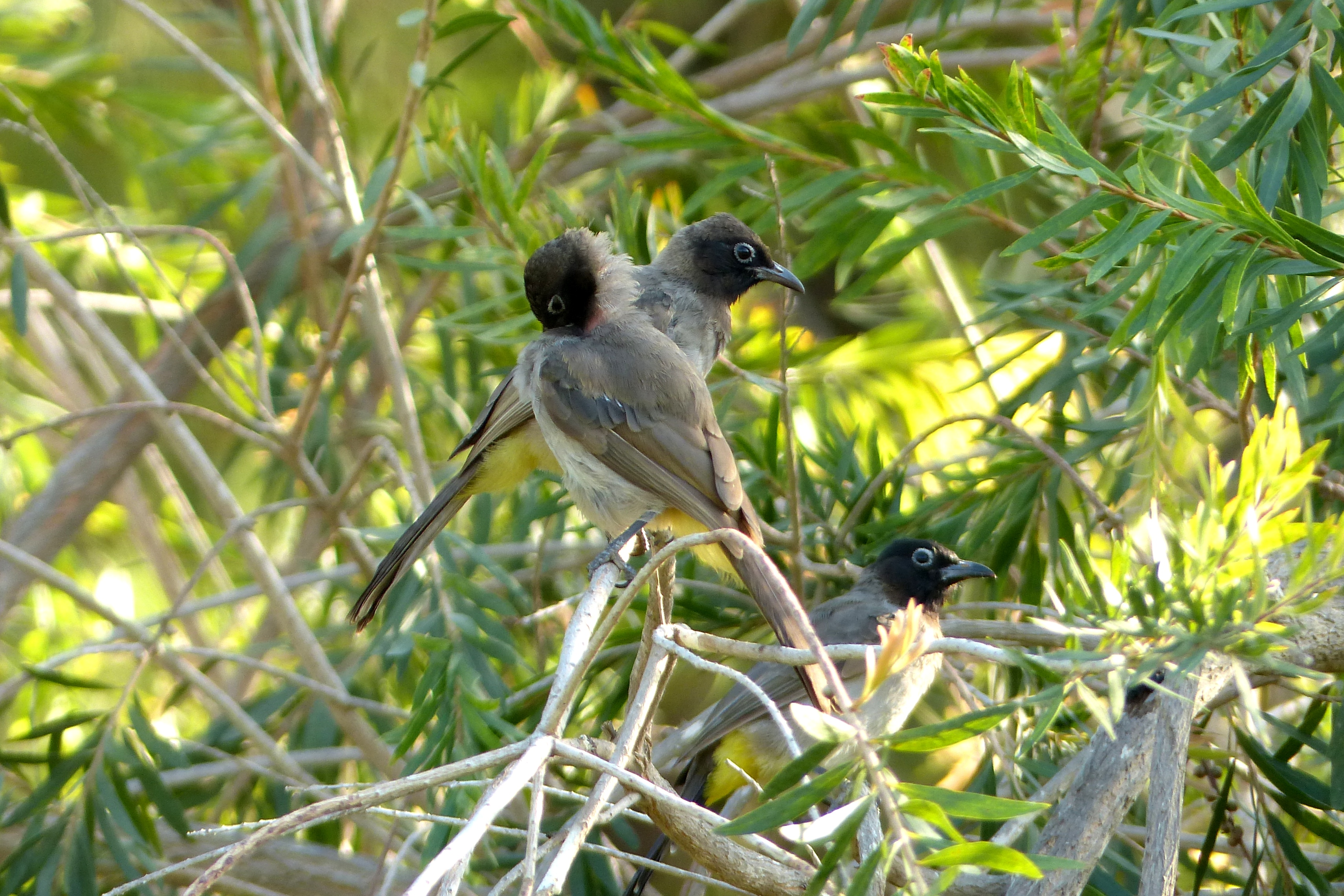 Die Art lebt sehr gesellig